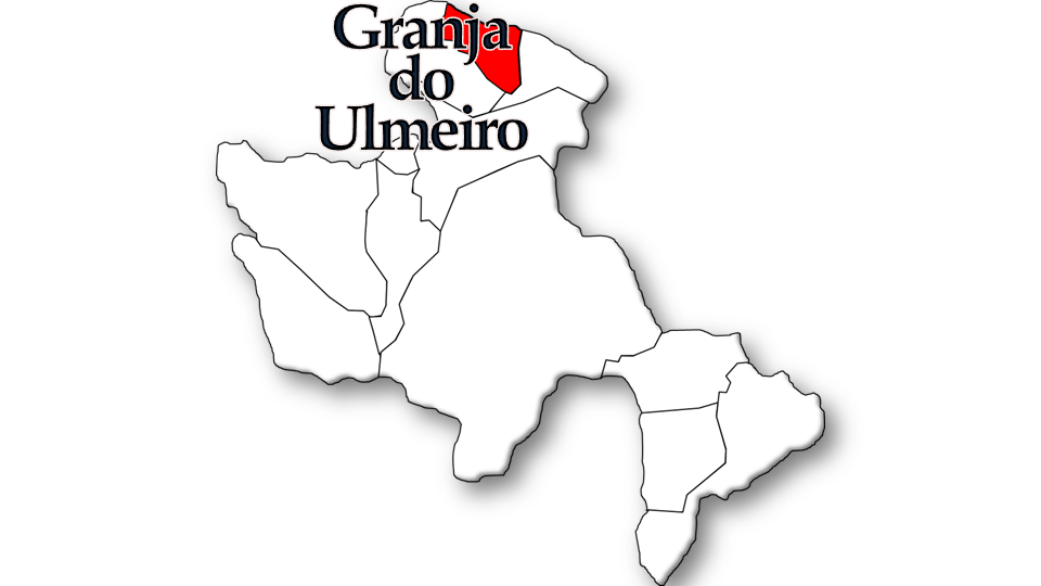 População